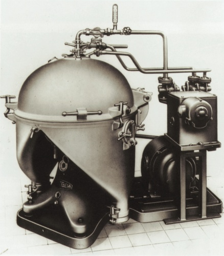 Erster selbstentleerender Separator